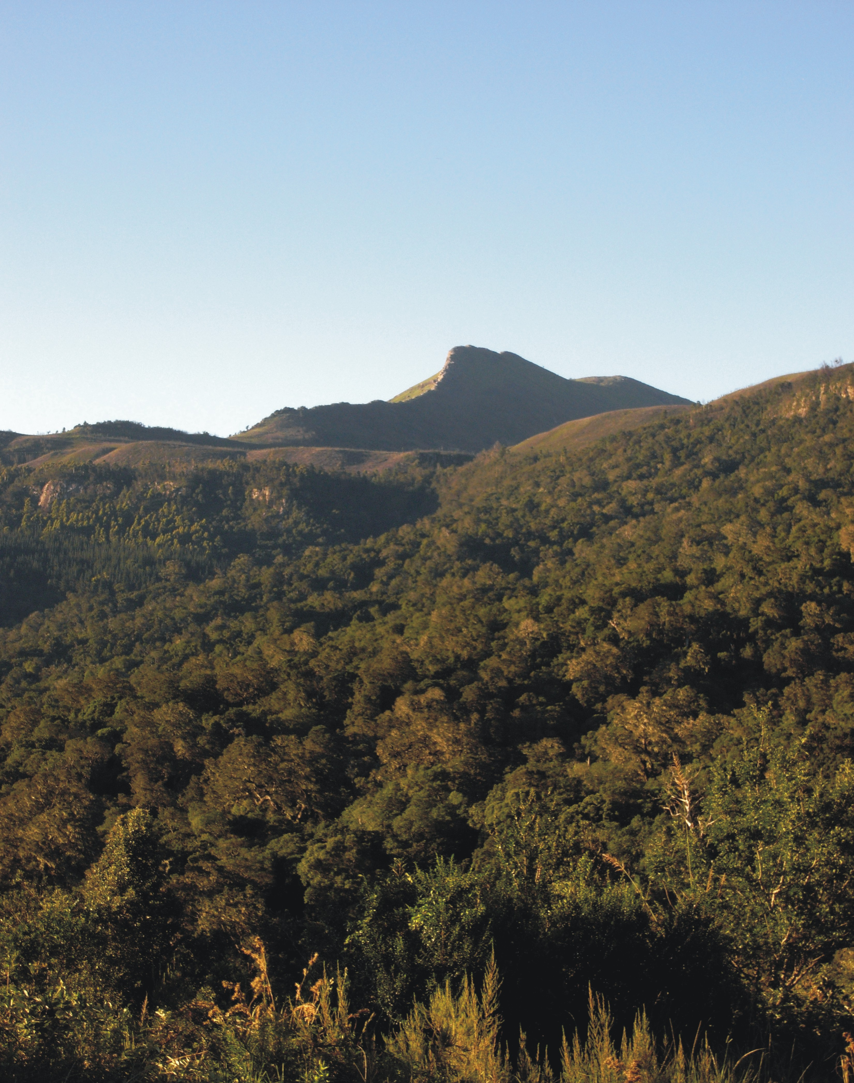 Amathole-Berge, Waldbestand im Hogsback (Eastern Cape, Südafrika)